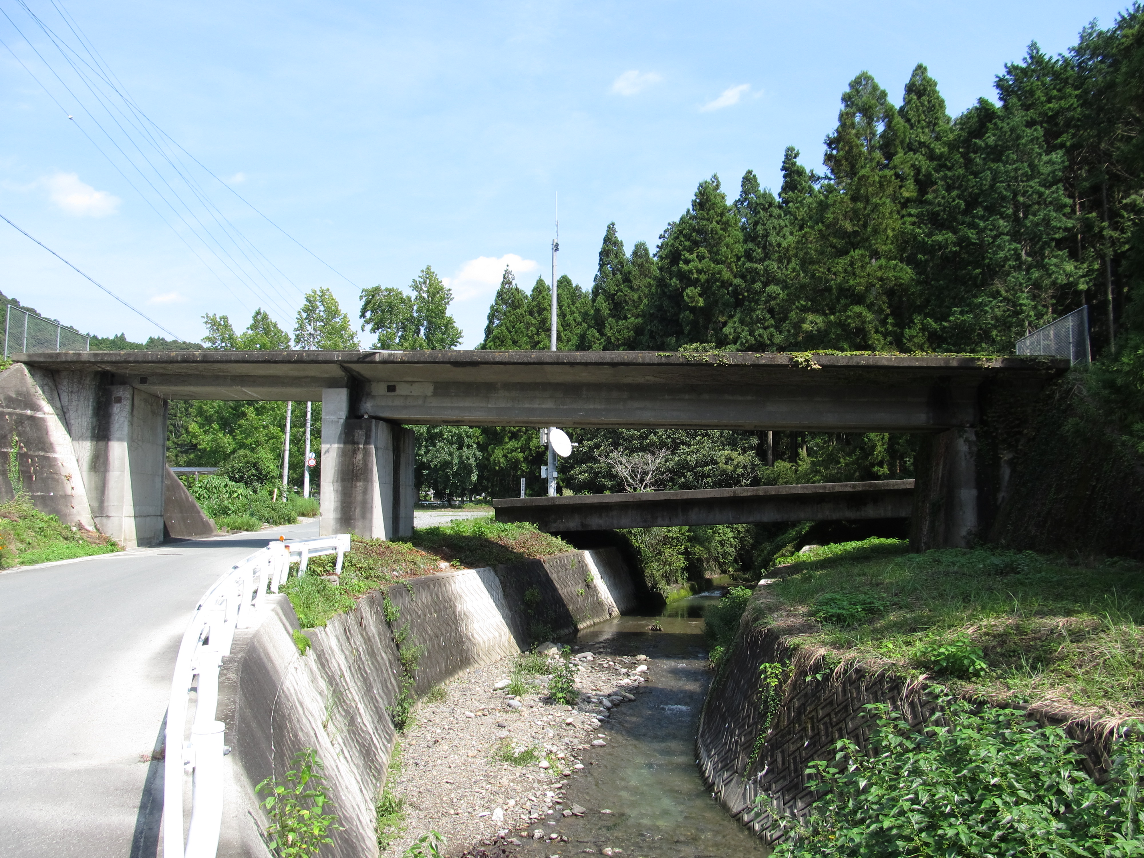 静岡県浜松市天竜区にある国鉄佐久間線（未成線）の阿蔵川橋梁。